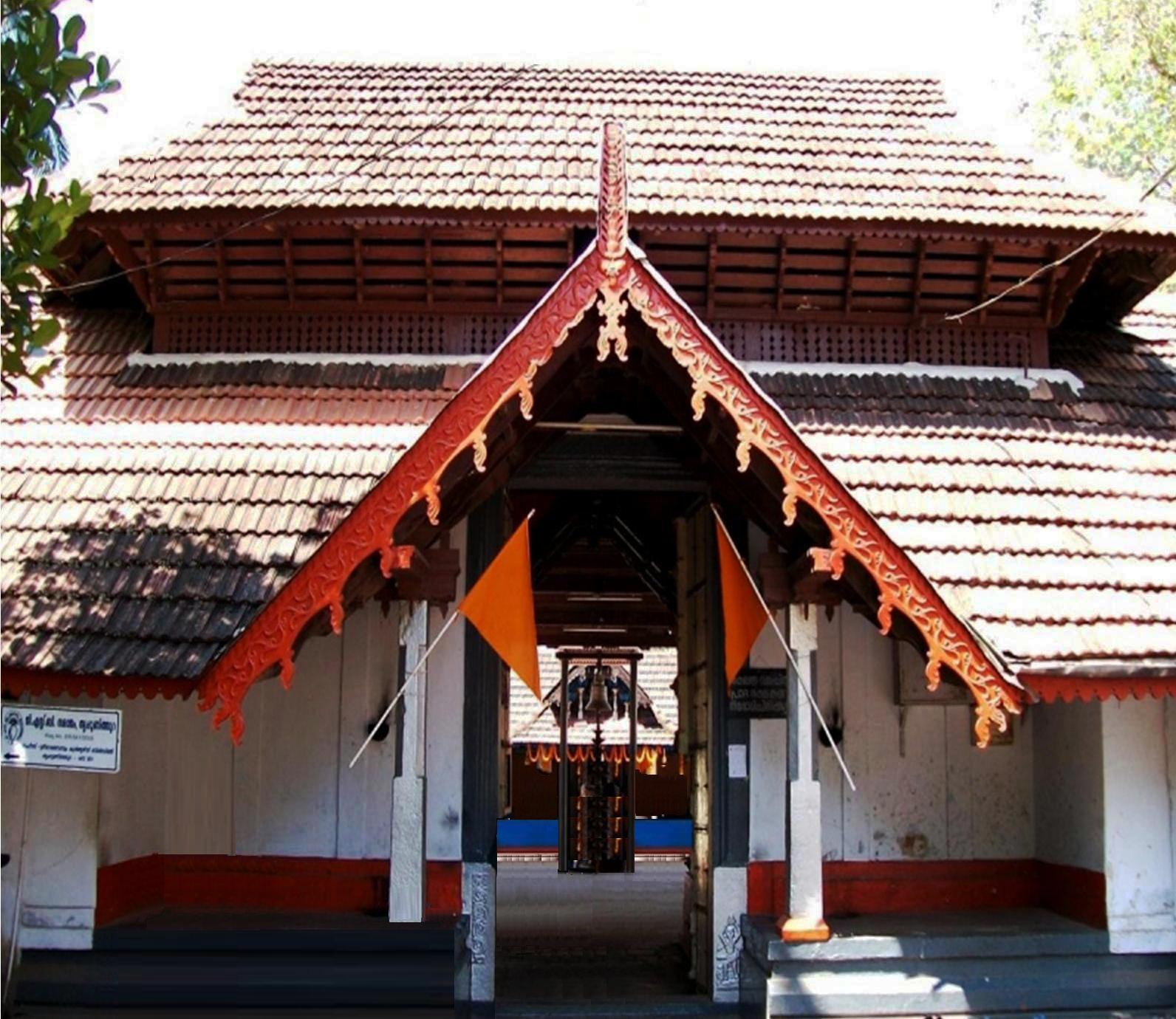 ശ്രീരാമക്ഷേത്രം തൃപ്പൂണിത്തുറ